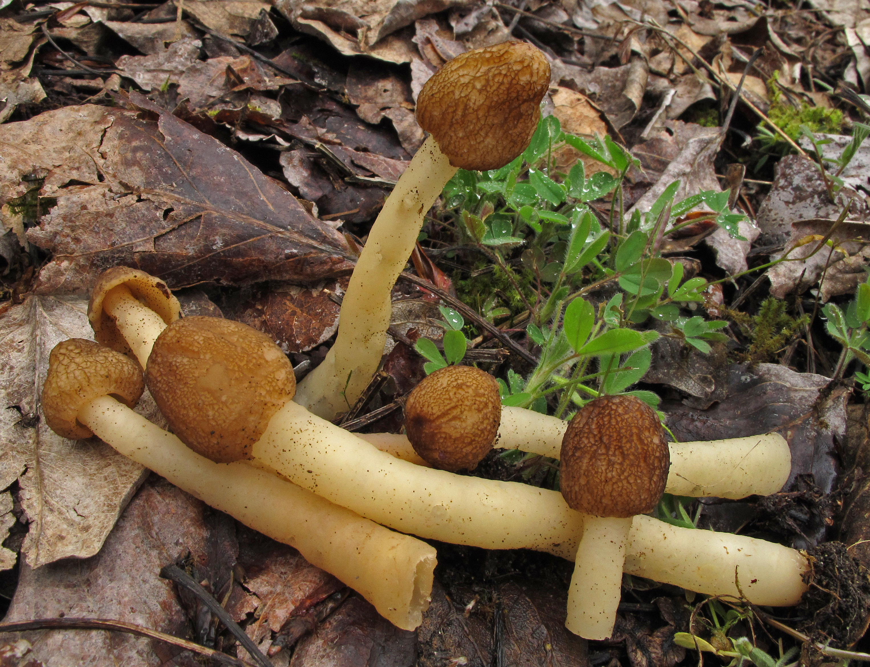 Verpa conica (O.F. Müll.) Sw., Location: Sauvie Island, Oregon, USA